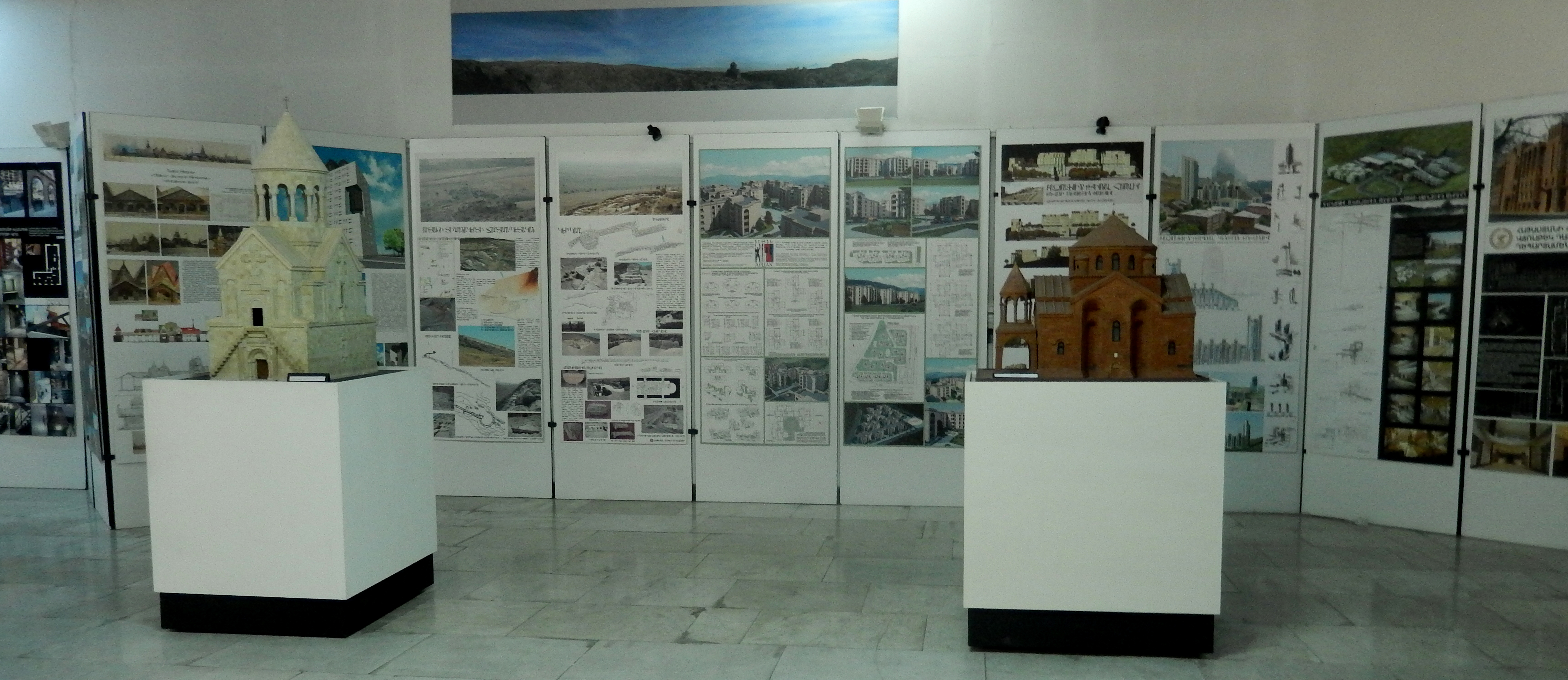 Ճարտարապետության ազգային թանգարան-ինստիտուտ